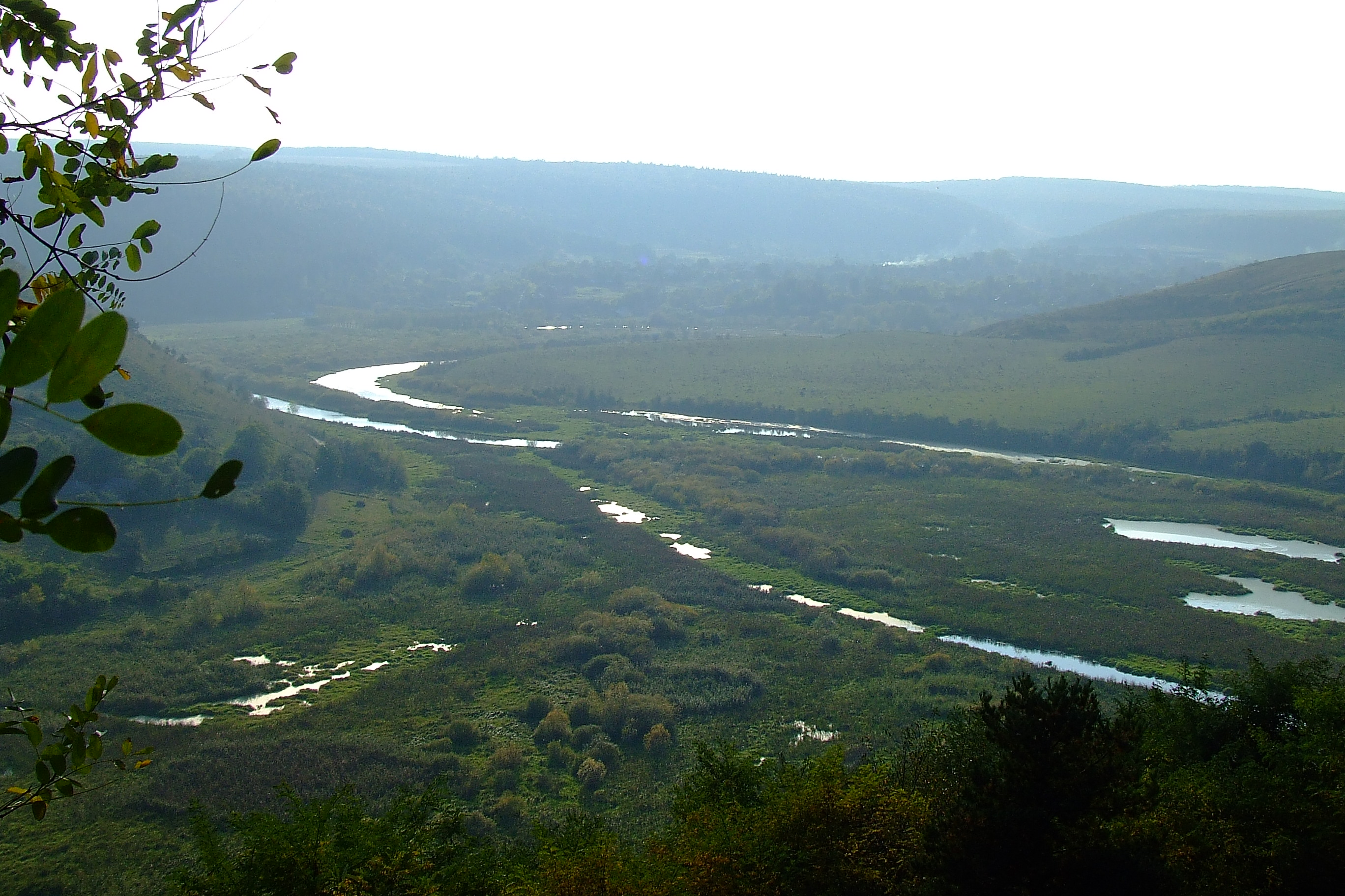 «Серет коло Більче Золотого»